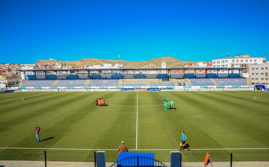 Estadio Chipola en Alhucemas